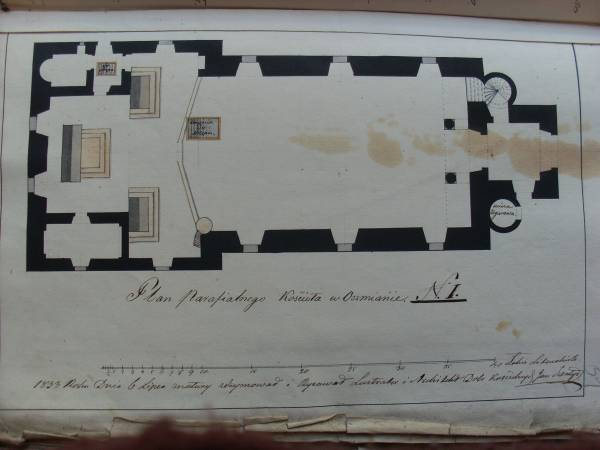 Беларуская (тарашкевіца): Ашмяны (Ašmiany), пляц Рынак (plac Rynak) з боку вуліцы Гальшанскай (vulica Halšanskaja). Касьцёл Сьвятога Міхала Арханёла